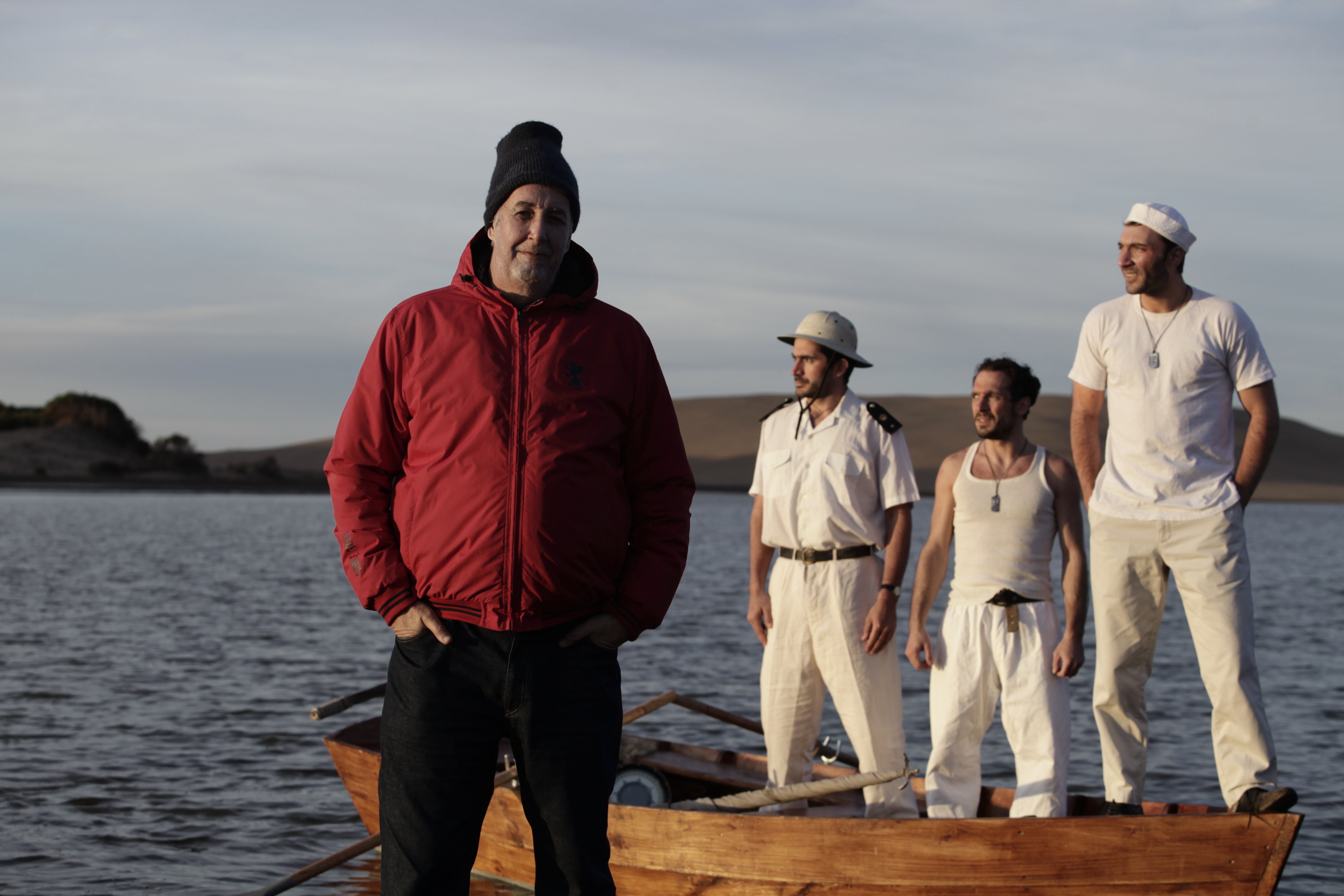 Ricardo Preve en el rodaje de Volviendo a casa